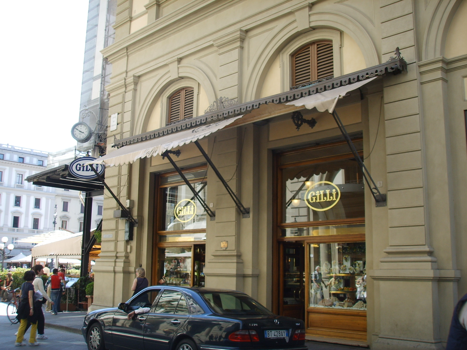 Caffé gilli out